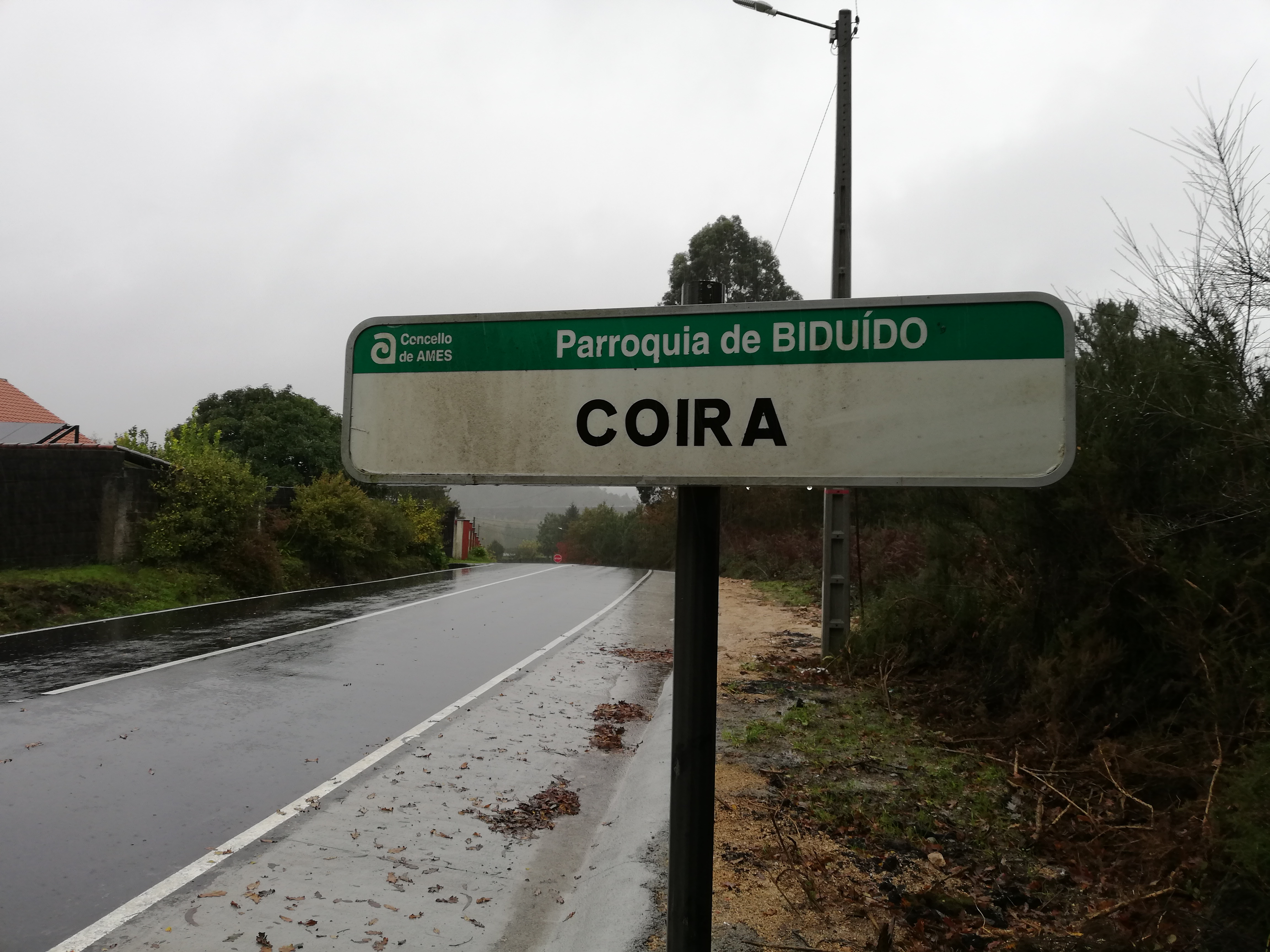 Sinal en Coira, Biduído, Ames.